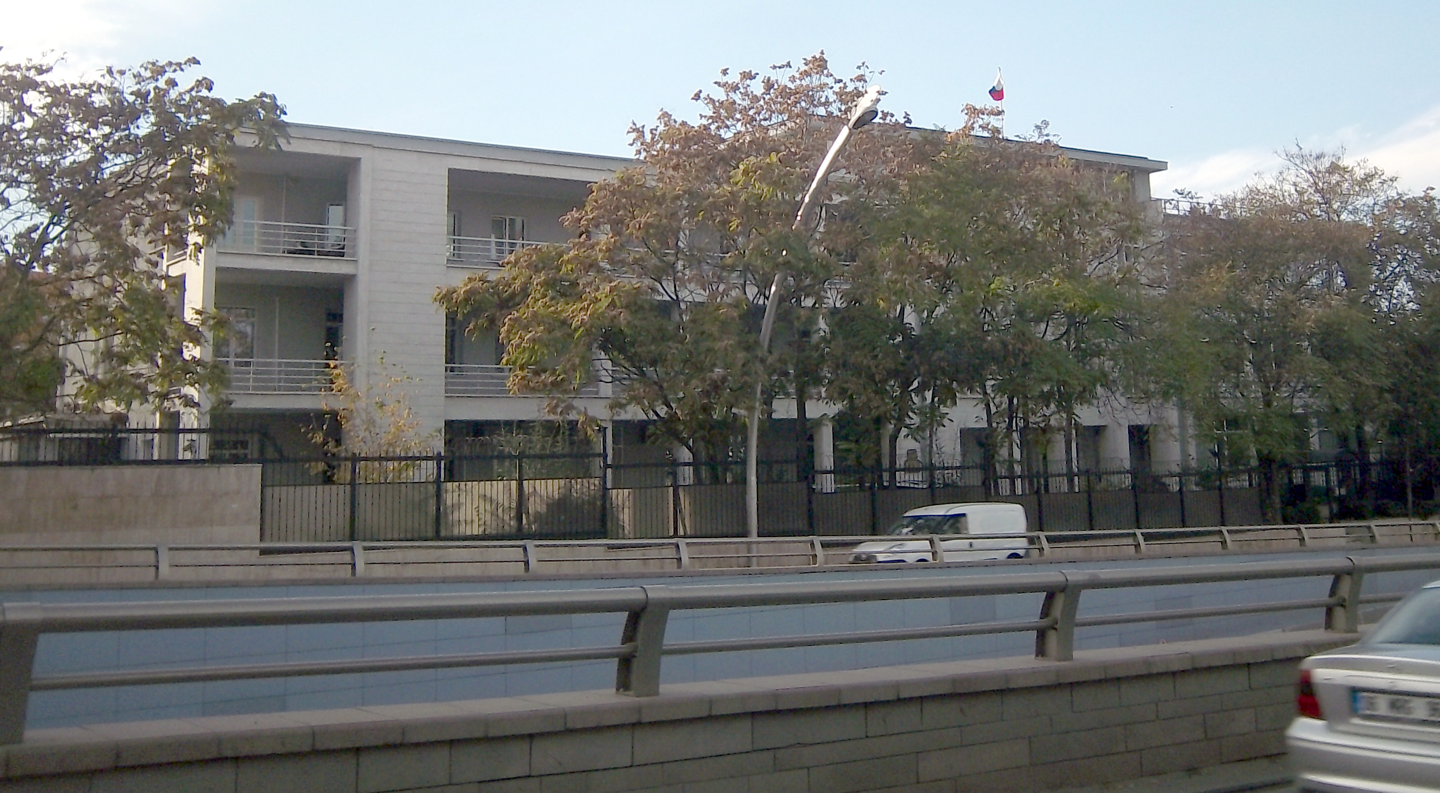 Srpskohrvatski / српскохрватски: Ambasada Ruske Federacije u Ankari.